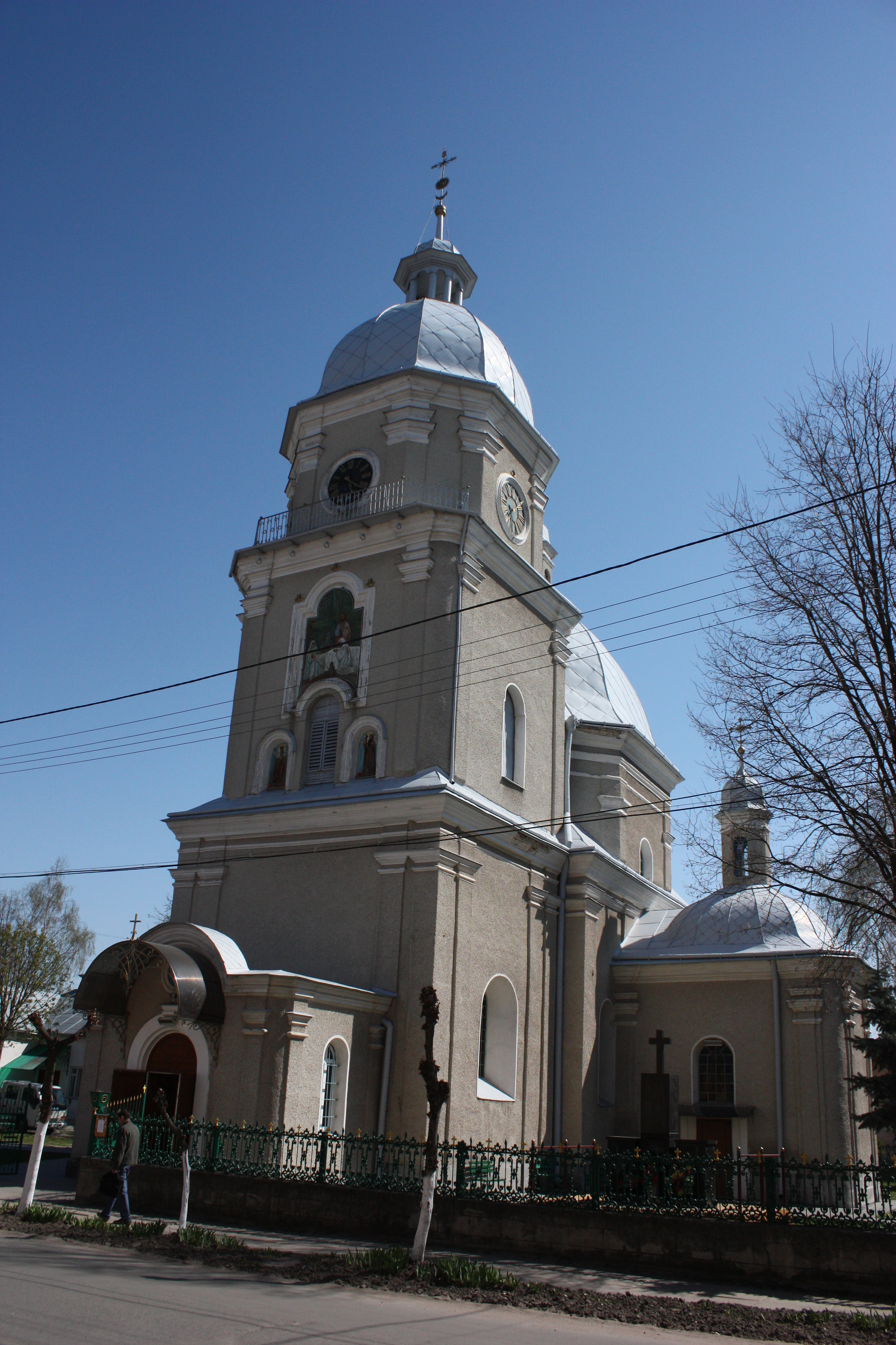 cs: Toto není kostel sv. Jura, ale kostel Narození Přesvaté Bohorodice (Panny Marie). uk: Це не церква св. Юра, але Церква Різдва Пресвятої Богородиці.